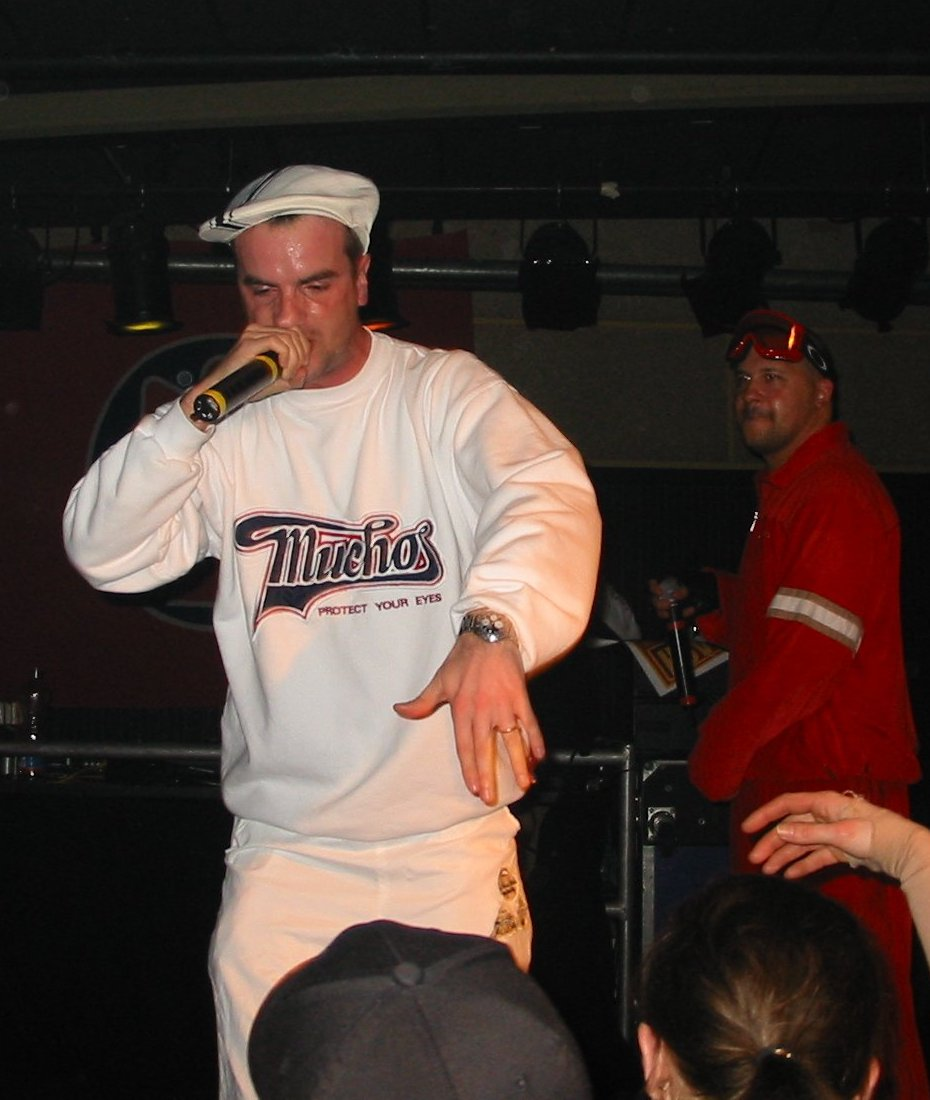 Toni L, Der Pate aka Der Funkjoker während eines Auftritts im Jahr 2004.